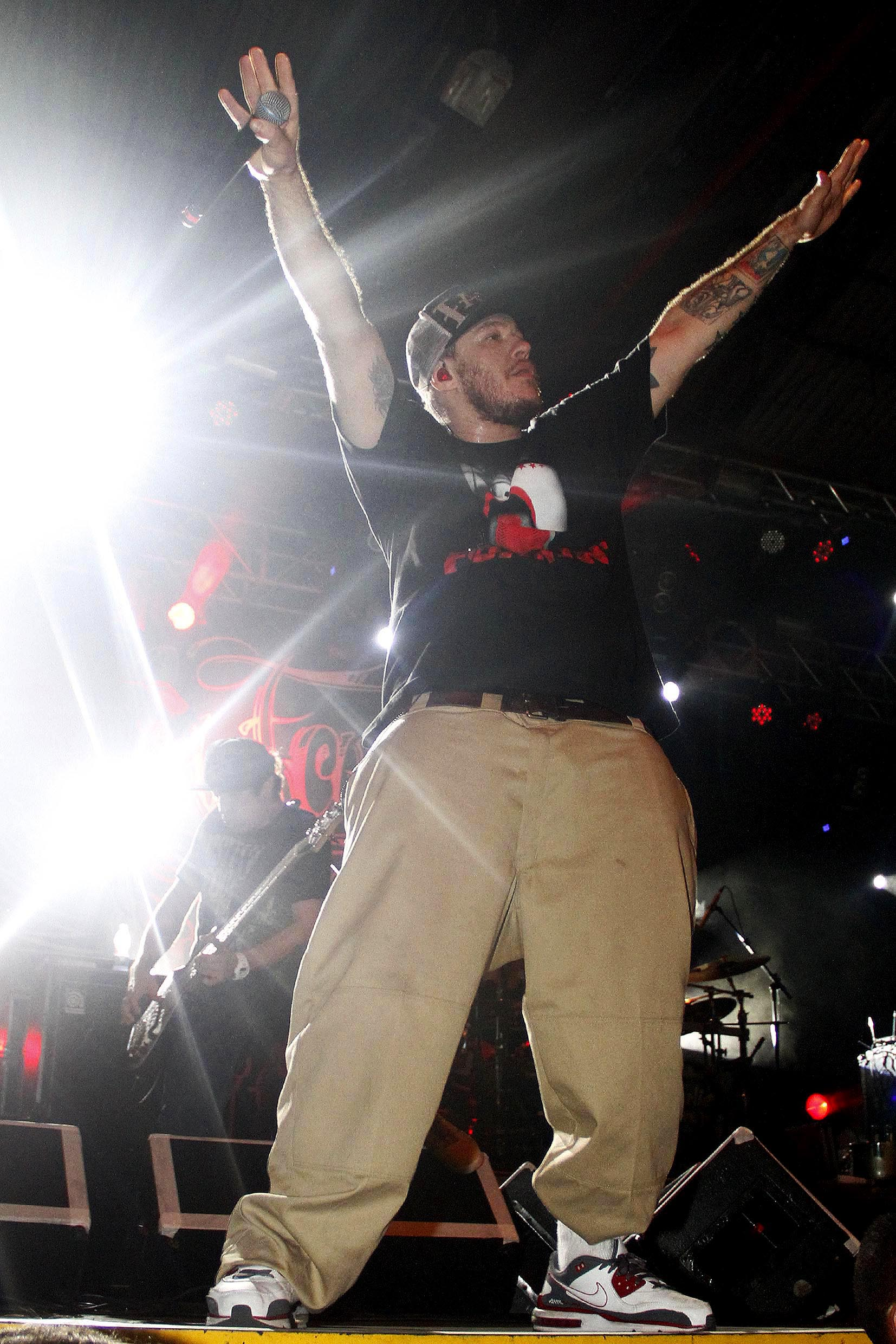 A banda Charlie Brown Junior em 20 de Outubro de 2012 durante o seu show de lançamento do CD e DVD “Música Popular Brasileira”. Foto: Guilherme Testa